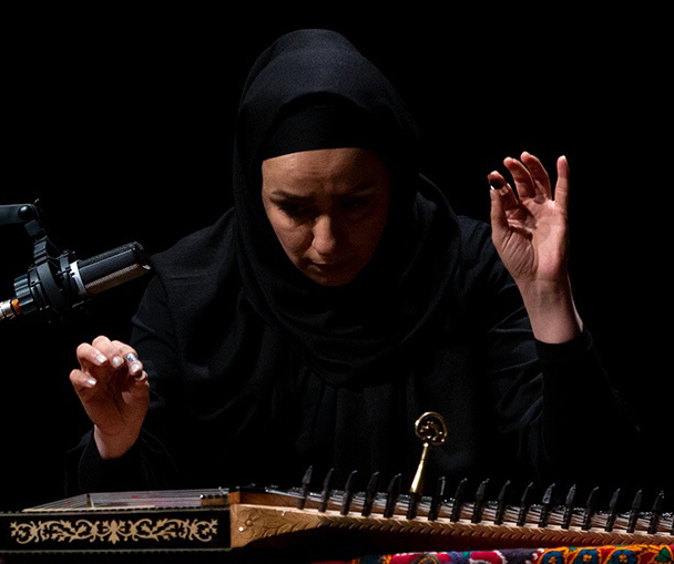 پریچهر خواجه سی‌ و‌ چهارمین جشنواره موسیقی فجر فرهنگسرای نیاوران ۲۶ بهمن ۱۳۹۷